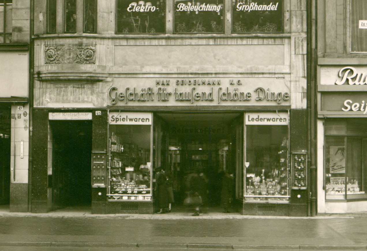 Wrocław, Rynek 48. Pierzeja północna (tzw. Targ Łakoci; Naschmarkt). Kamienica Pod Głową św. Jana (Zum Haupt Johannes). Dolna kondygnacja budynku, wystawy sklepowe.